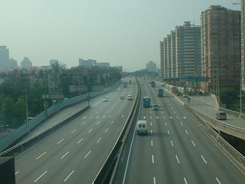 華南快速幹線黃埔立交